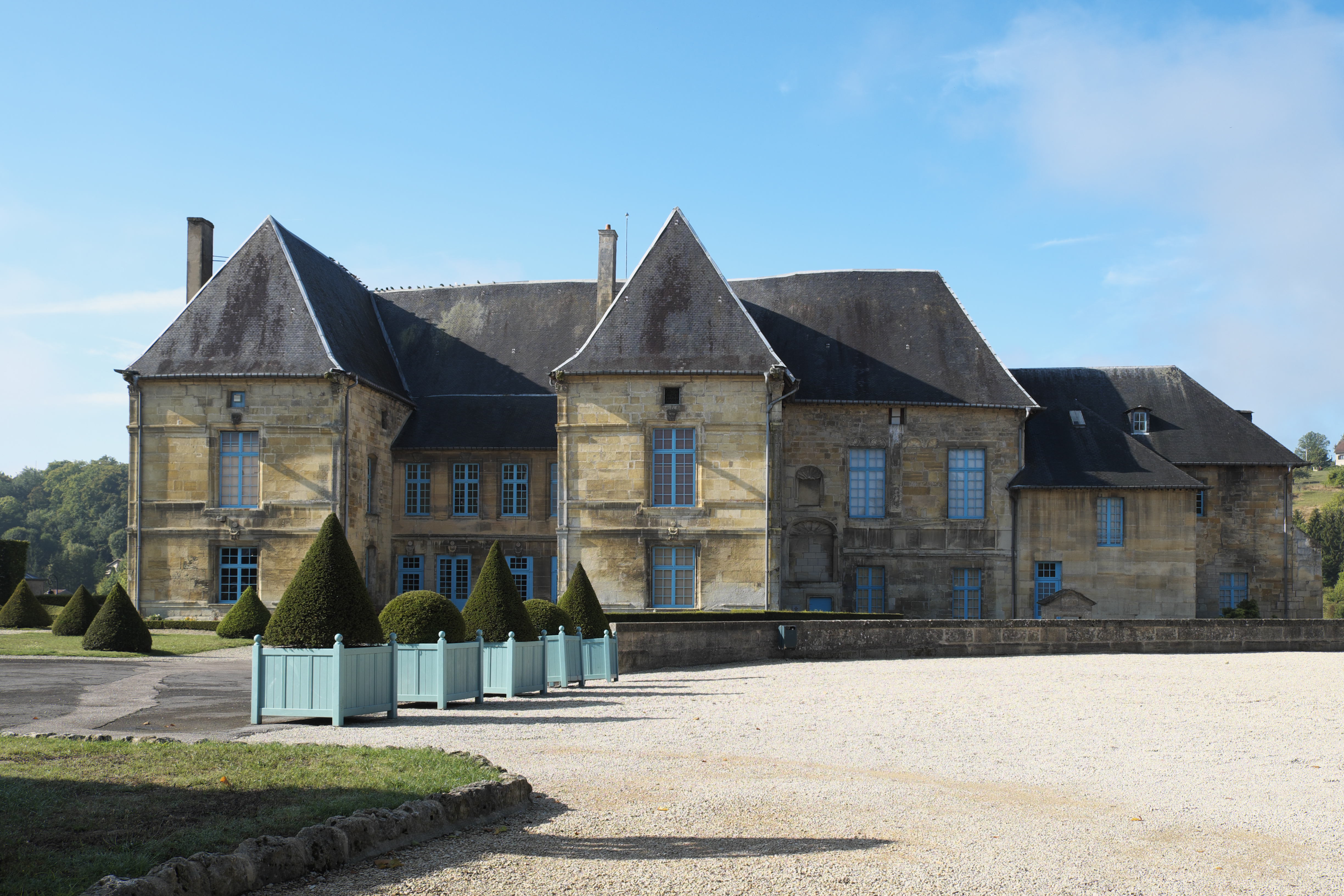 Château des ducs de Bar (Schloss der Grafen von Bar) in Bar-le-Duc im Département Meuse (Lothringen/Frankreich) .